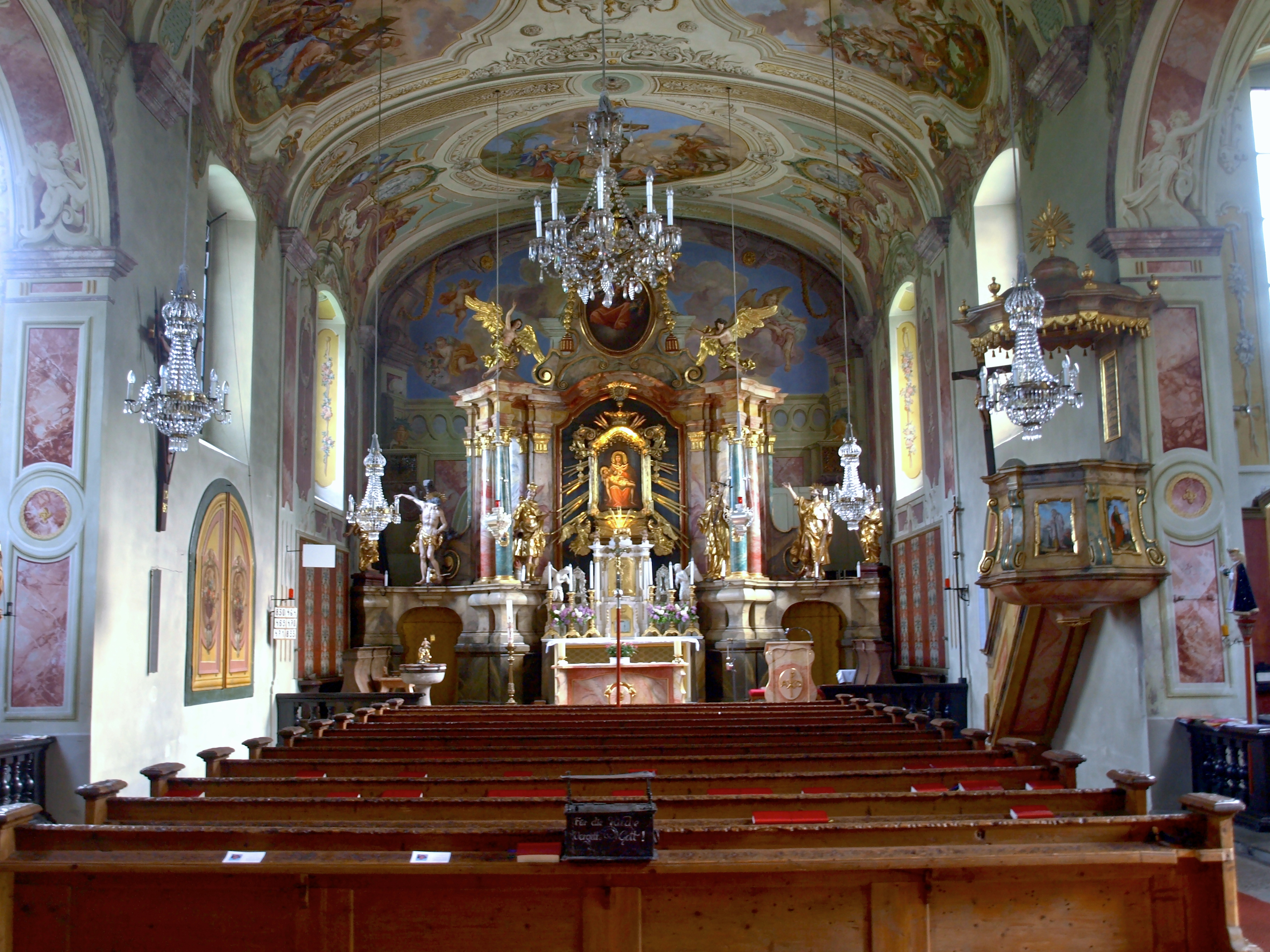 Kath. Pfarrkirche hl. Barbara